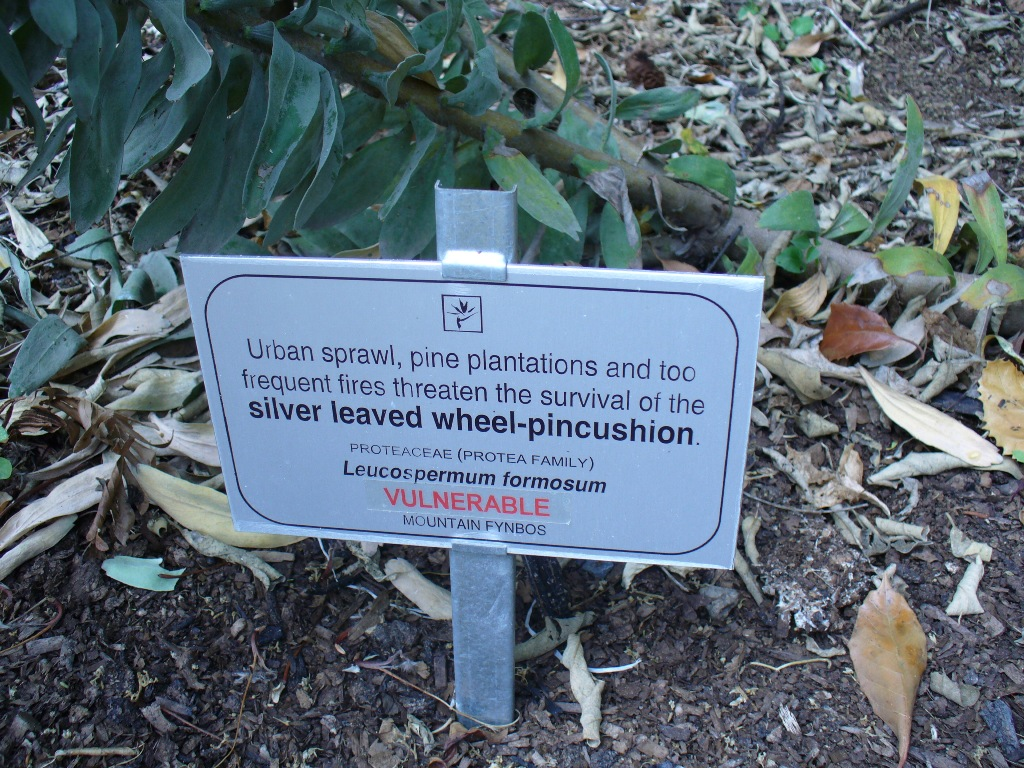 L formosum sign